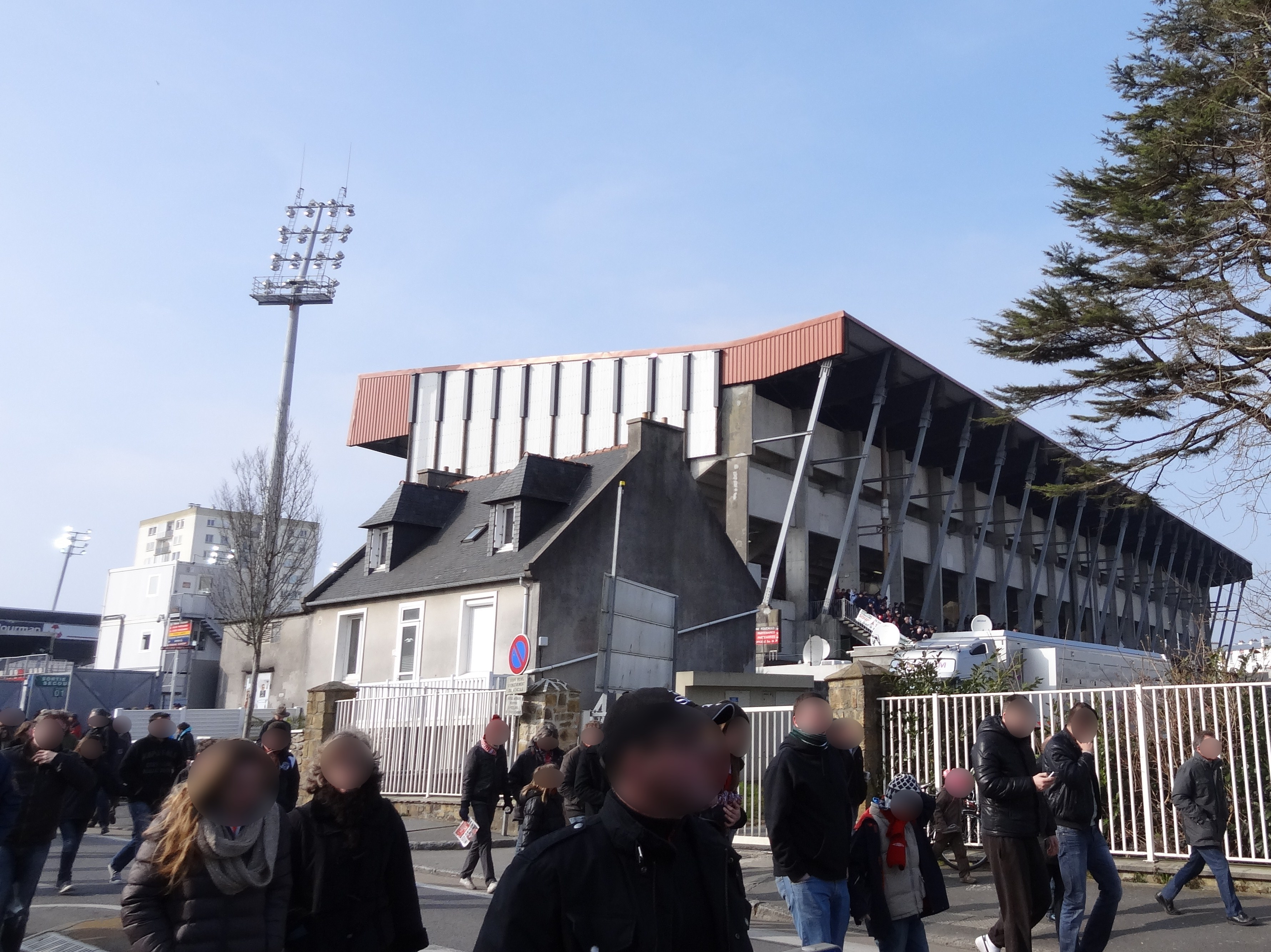 Match de football (Ligue 1) entre le Stade brestois 29 et l'Olympique lyonnais, le 3 mars 2013